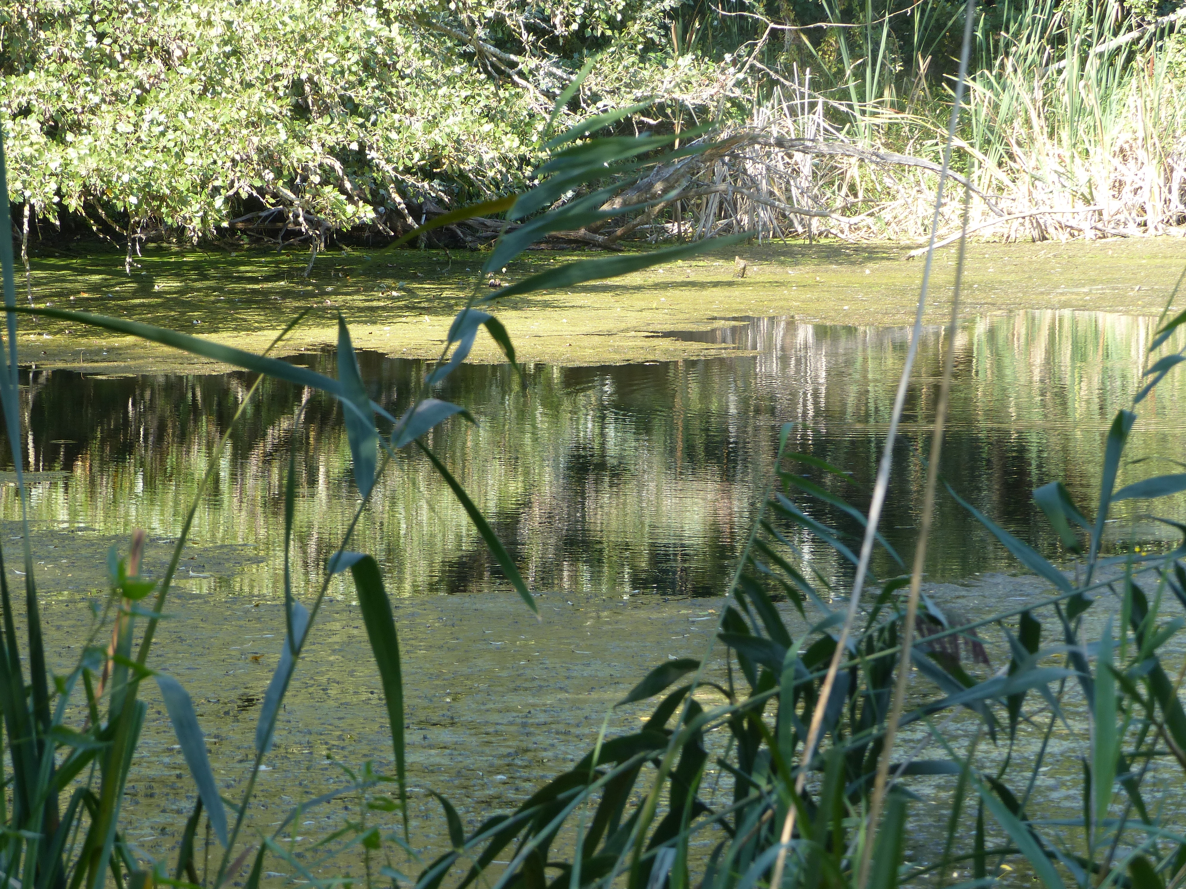 A felvétel 2017. szeptember 9-én, szombaton készült. Kóny, Rábaköz. A Tündértó a Halastó melletti tó, mintegy 2,5 km-re Kóny községtól.